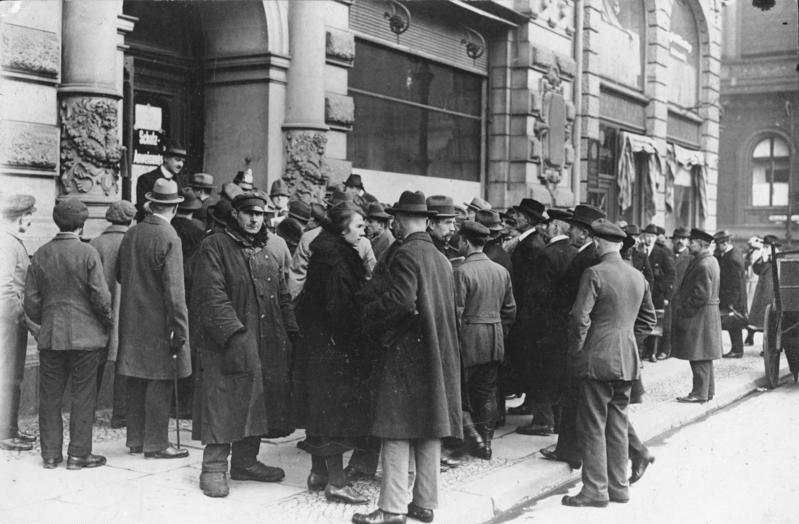 Zentralbild Mit der Ausgabe der neuen Rentenmark am 15.11.1923 wird die Inflation in Deutschland beendet. U.B.z: das Anstehen vor der Ausgabestelle von Rentenmarknoten in der Oberwallstraße in Berlin. 8211-23